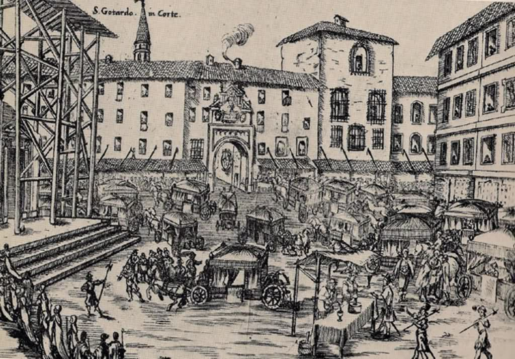 Piazza Duomo di Milano e Palazzo Ducale (ora Reale) in una stampa anteriore al 1770